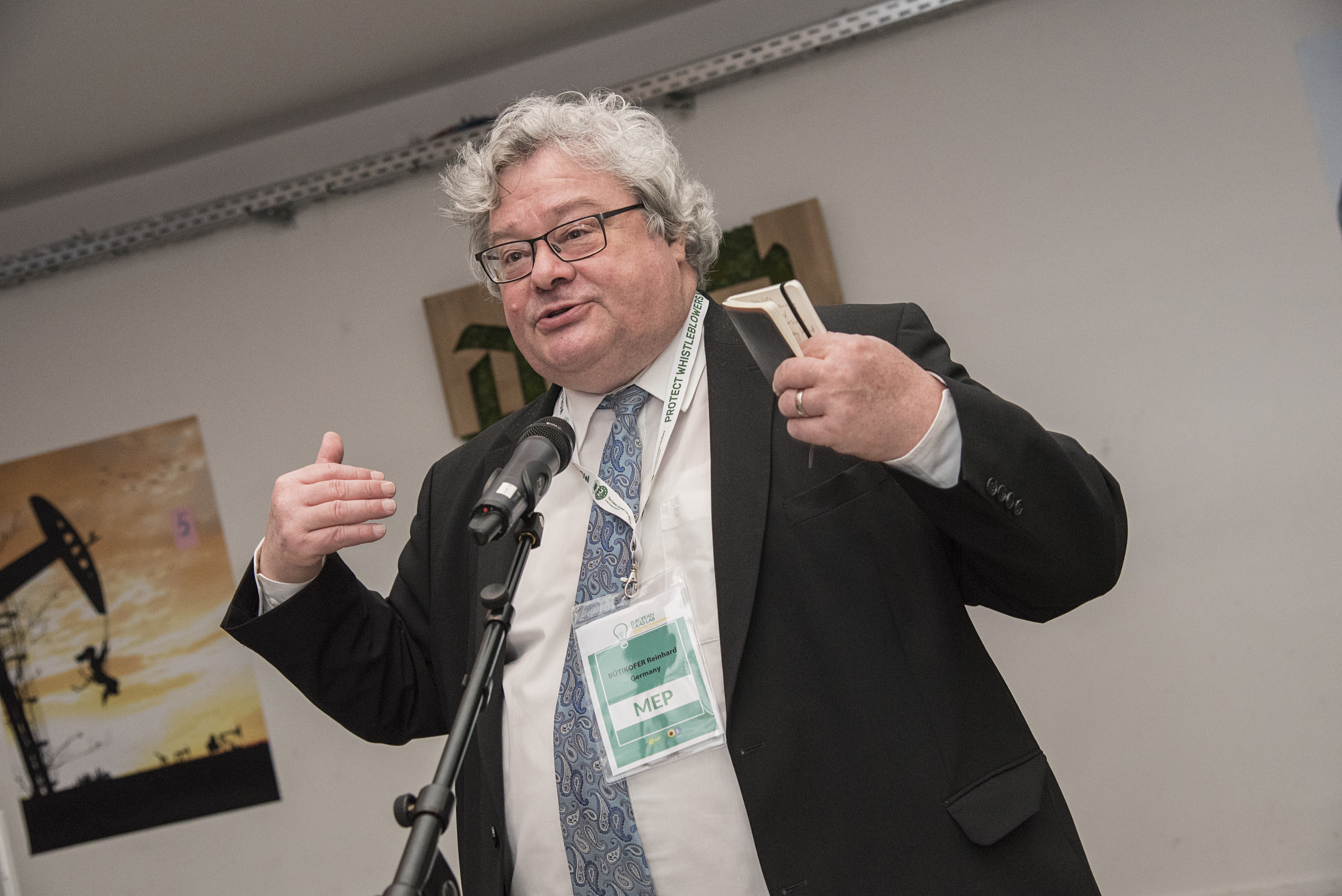 Greens meet Changemakers